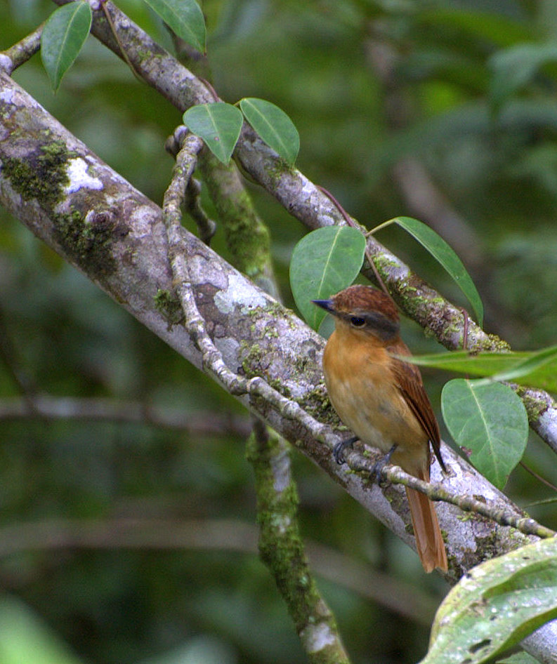 Pachyramphus castaneus, Estrada municipal "Sete Barras/Juquiá" no Vale do Ribeira